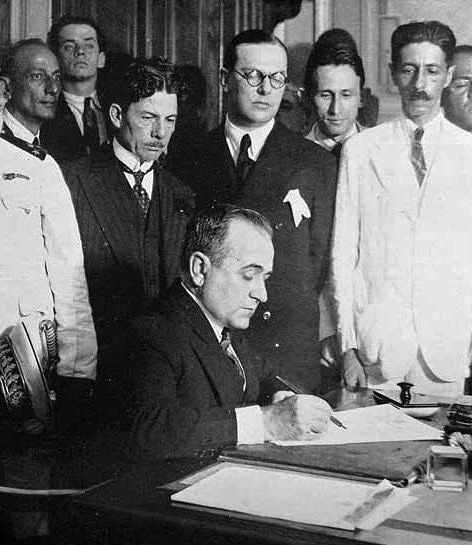 Getúlio Vargas nomeando os Ministros, em 03 de novembro de 1930. Ao fundo, de óculos: Lindolfo Collor.